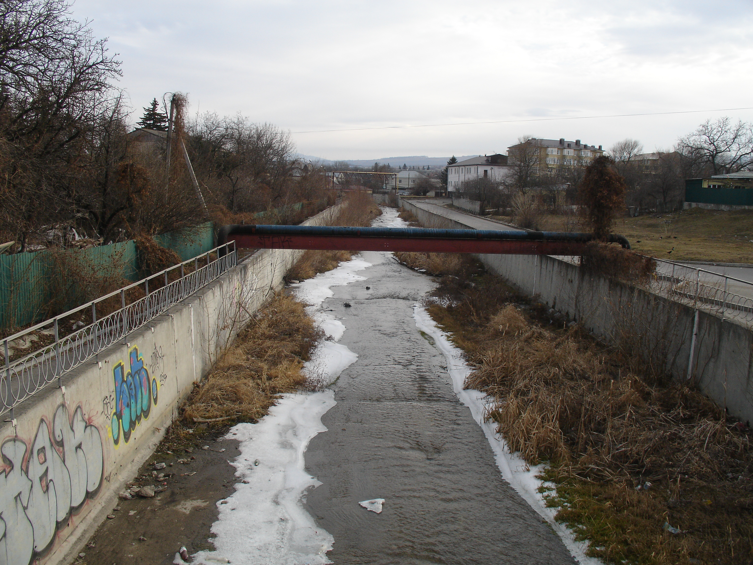 Река Бугунта в городе Ессентуки. Вид с моста по улице Октябрьская. Ставропольский край, Россия.